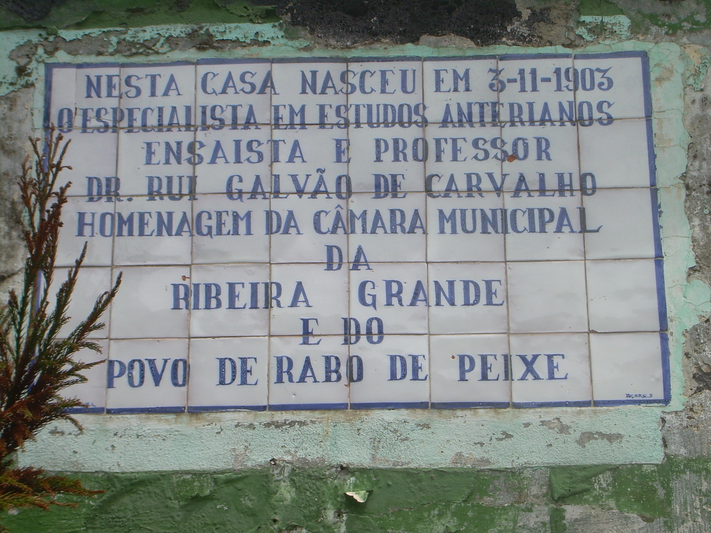 Placa que certifica que nesta casa nasceu Rui Galvão de carvalho.